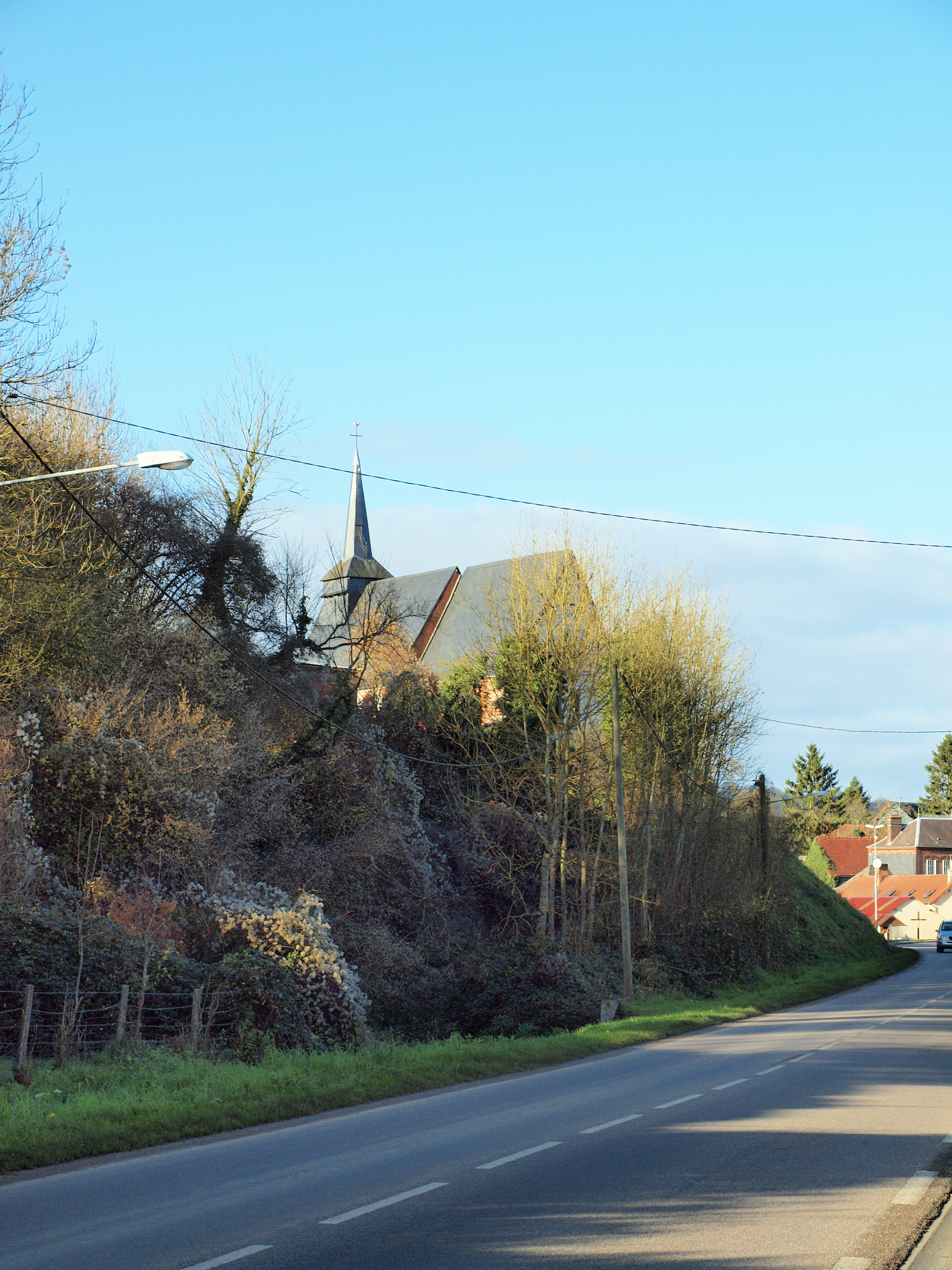 Bouafles (Vieux-Rouen-sur-Bresle, Seine-Inférieure, France) ; église.